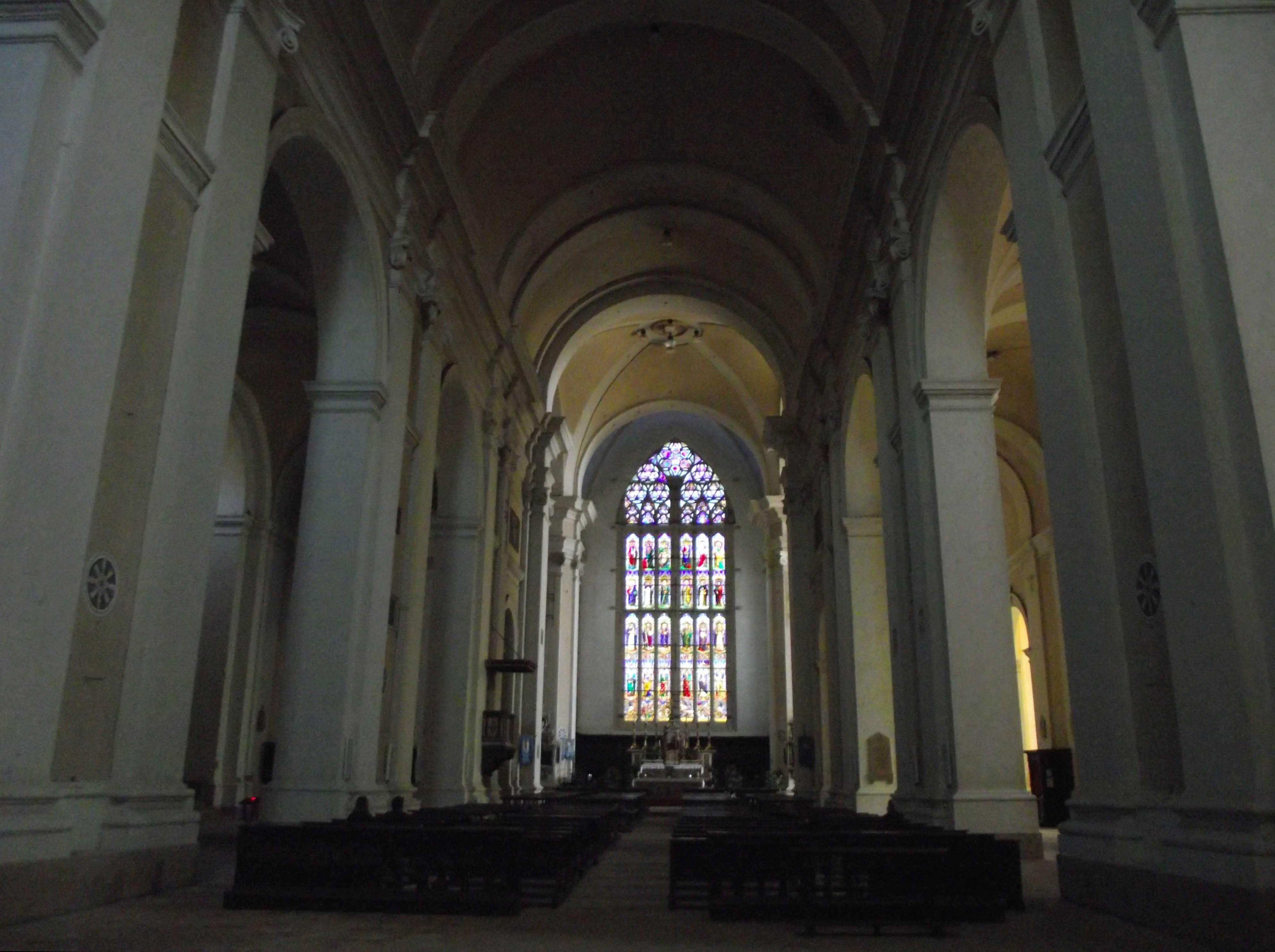 Perugia, Basilica di San Domenico